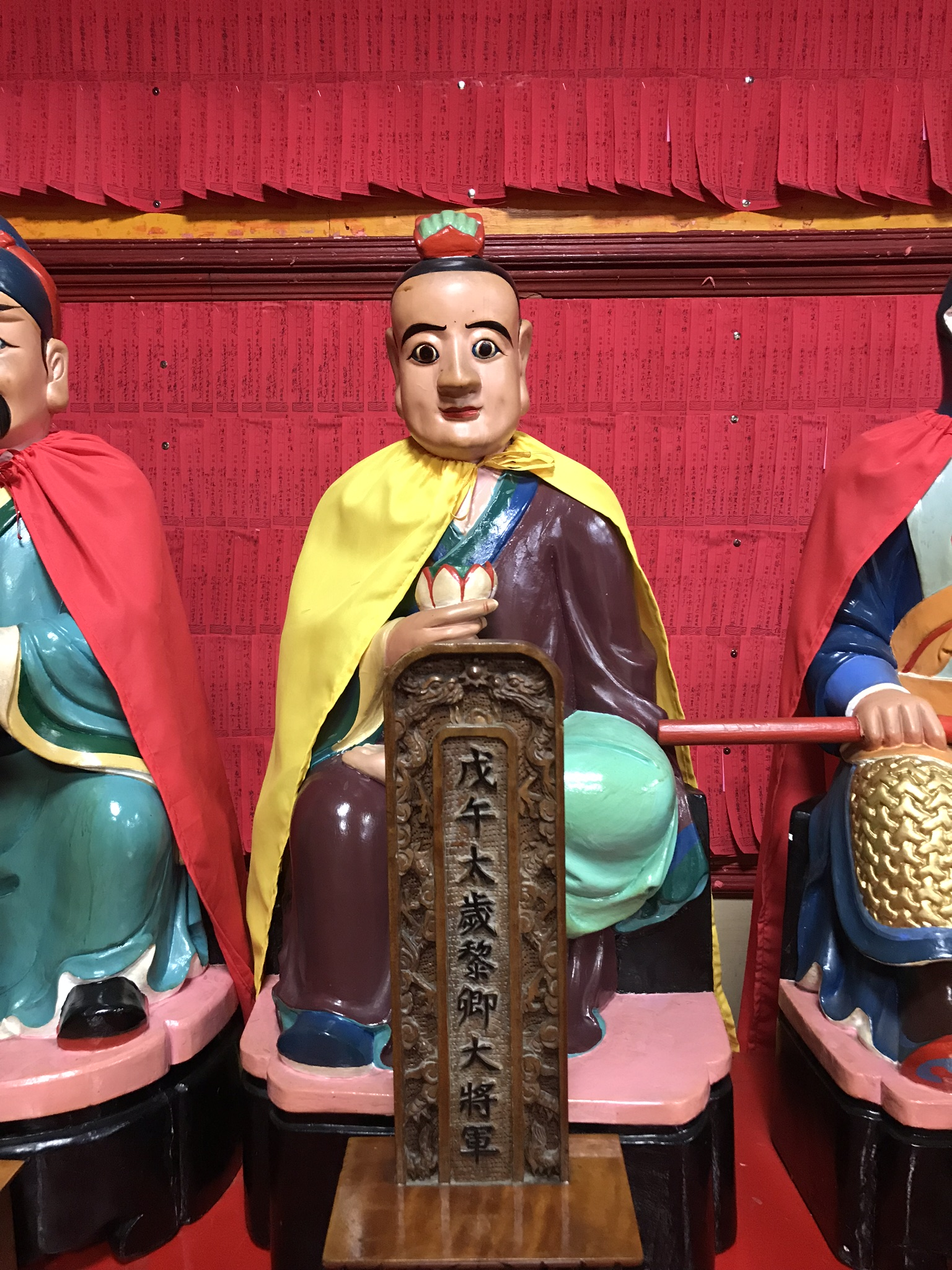 戊午太歲黎卿大將軍神像